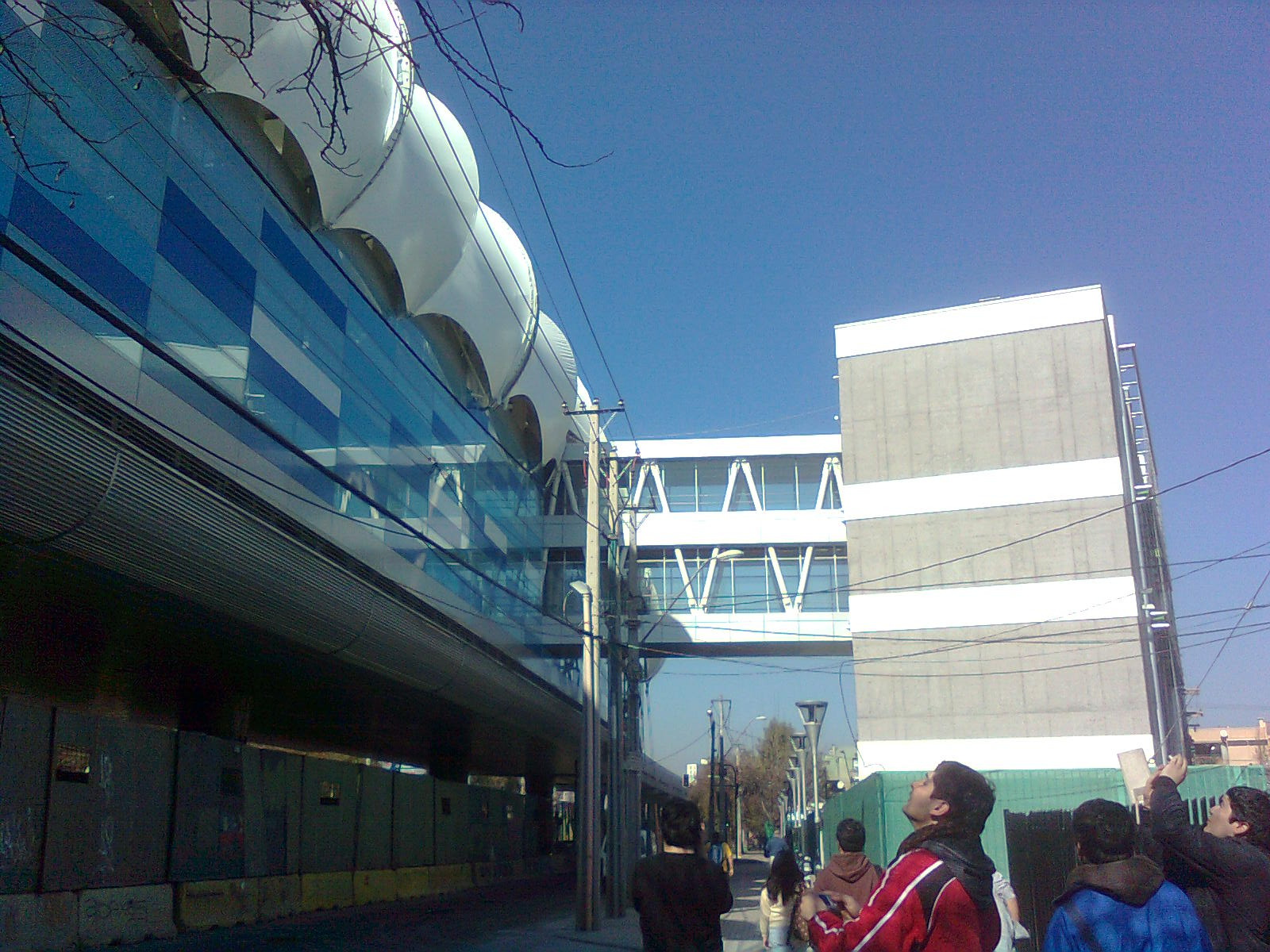 Vista de la estación de metro Laguna Sur, ubicada en la comuna de Pudahuel.